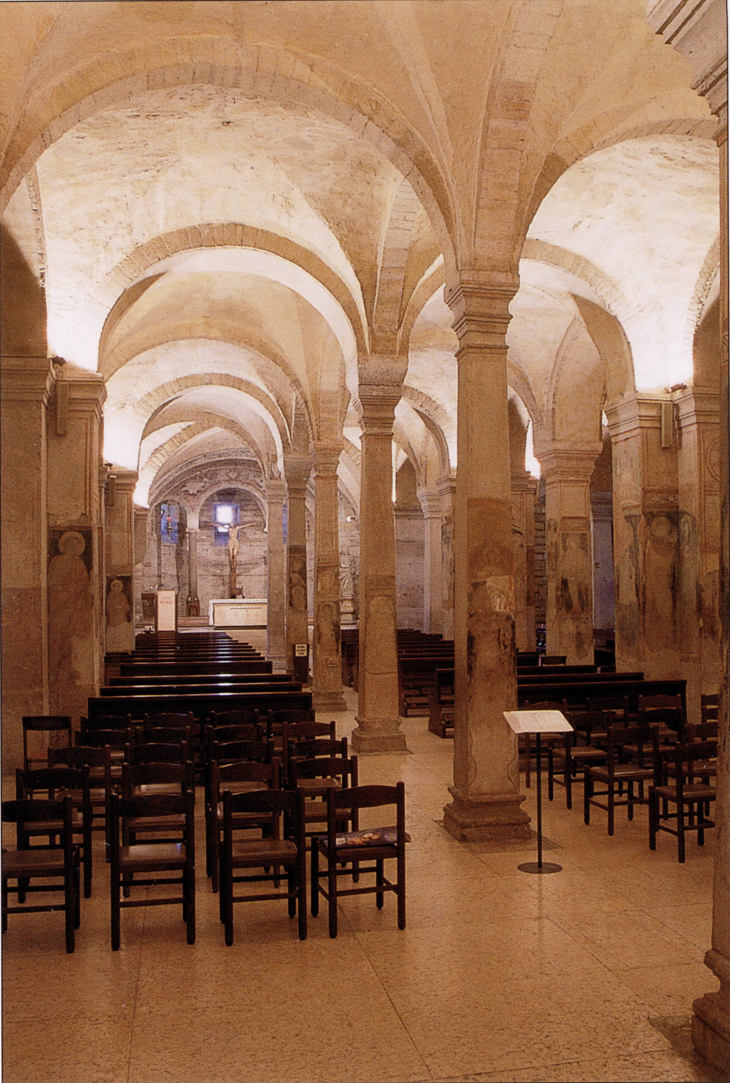 Verona - San Fermo Maggiore - Chiesa Inferiore - Interno